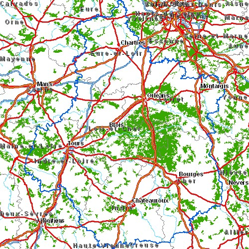 Carte routière de la région Centre Légende